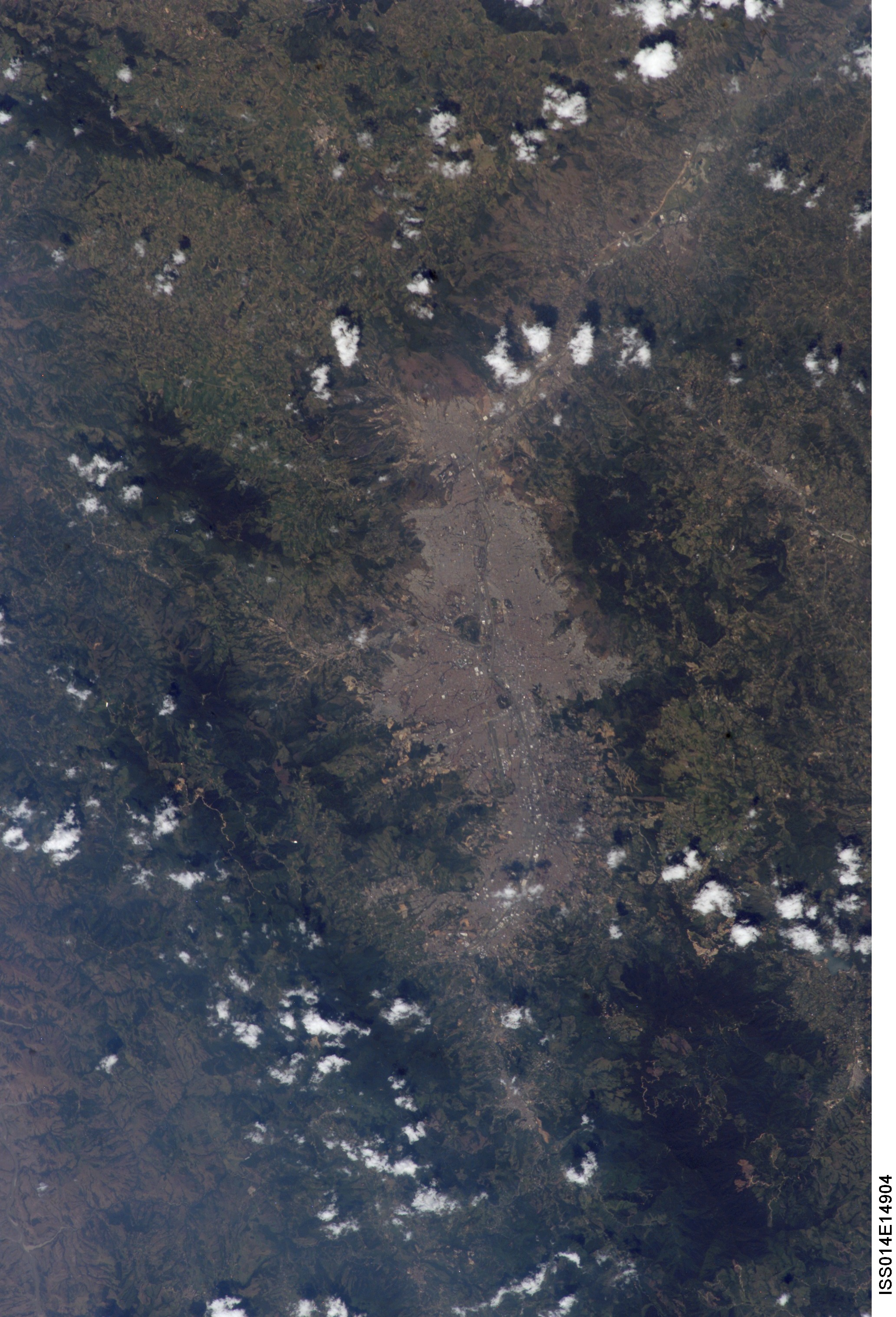 Imagen satelital de Medellín conurbado con otros 6 municipios del Valle Del Aburra , Colombia